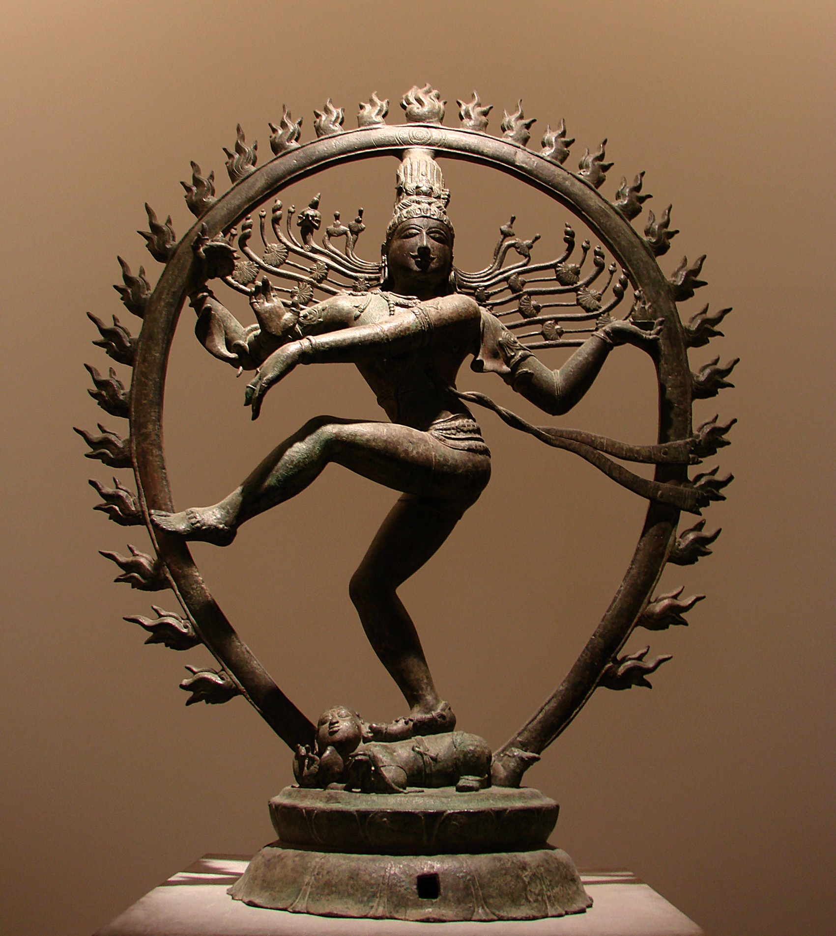 Shiva Nataraja (Seigneur de la danse). Inde, Tamil Nadu, époque Chola, 11ème siècle,bronze. Musée Guimet, Paris. Shiva tient le petit damara(tambourin) de la création dans sa main droite supérieure et l'étincelle de la création dans sa main gauche supérieure ;le geste de la main droite inférieure signifie "ne craignez rien" ,tandis qu'il désigne de la gauche inférieure la jambe gauche soulevée ,symbole de la délivrance .